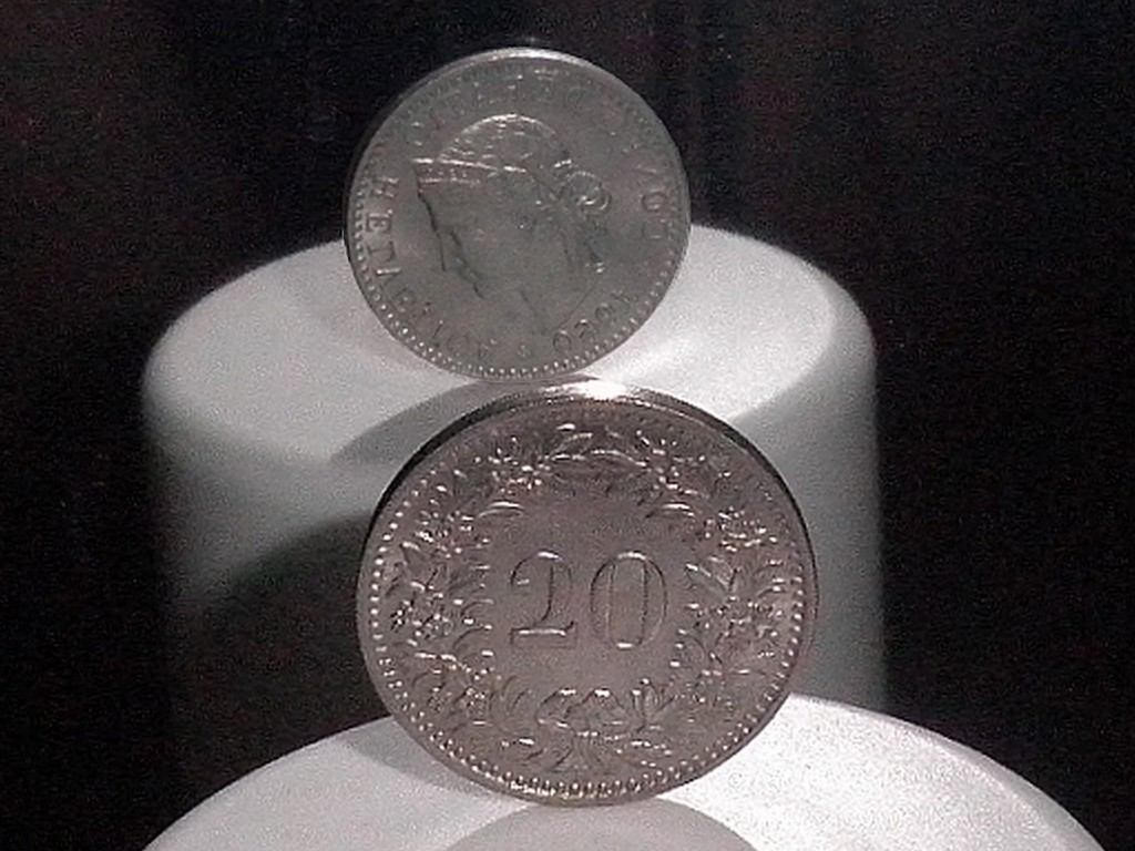 Pièce de 20 centimes de 1960 avec un décalage de 40°